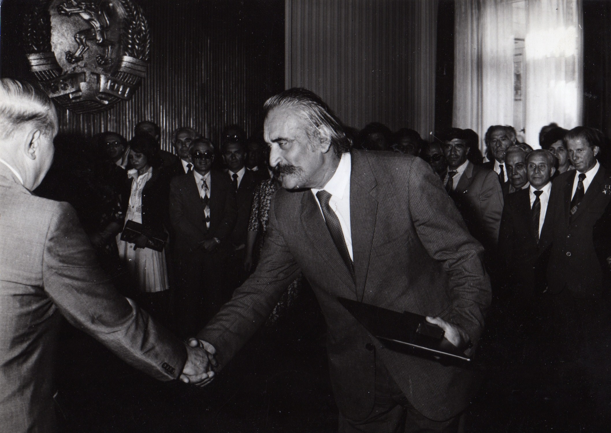 Тодор Живков награждава Асен Севарски със почетното звание „Заслужил деятел на културата“